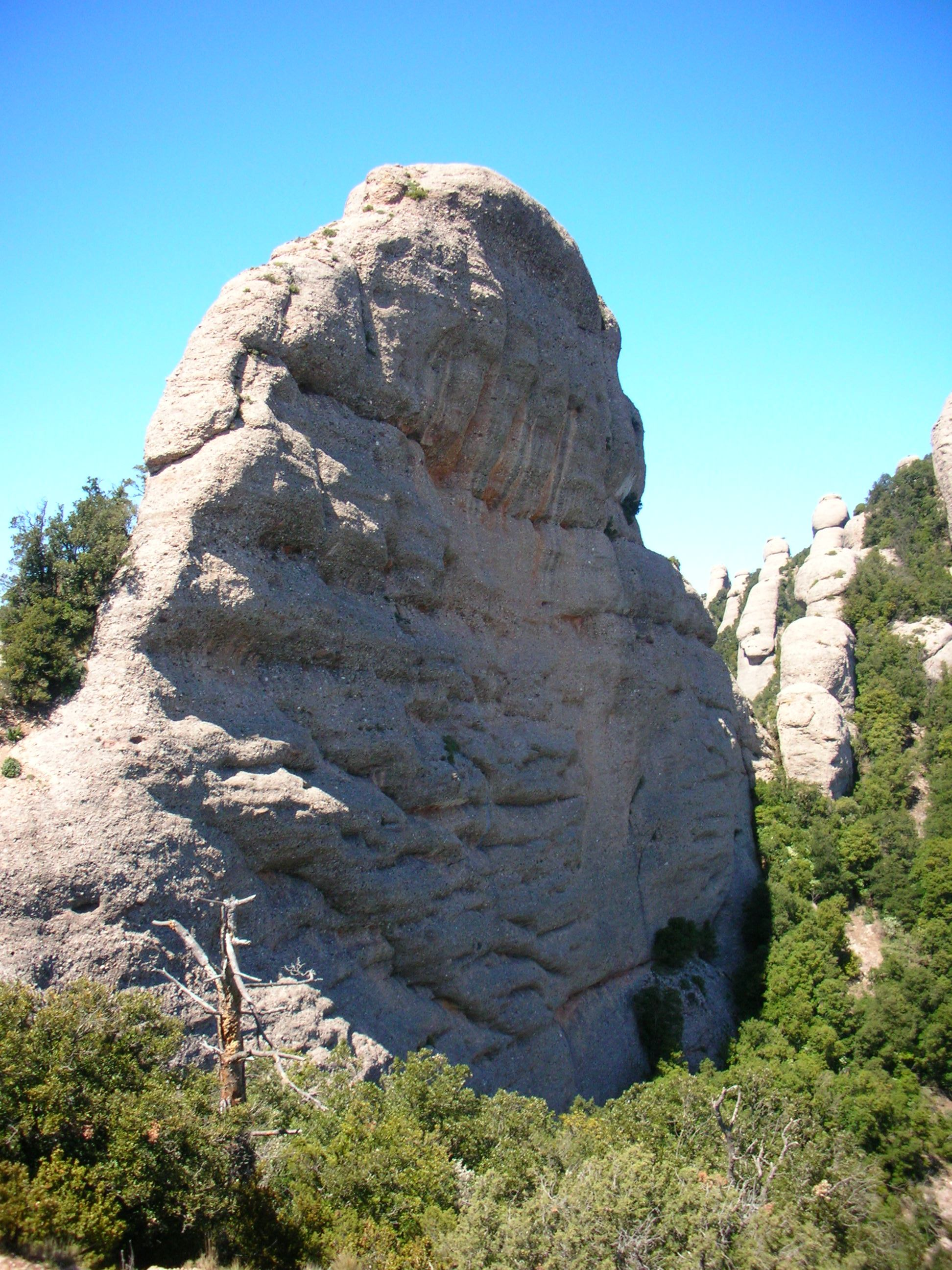 La Roca Plana dels Llamps des del cim del Montgrós